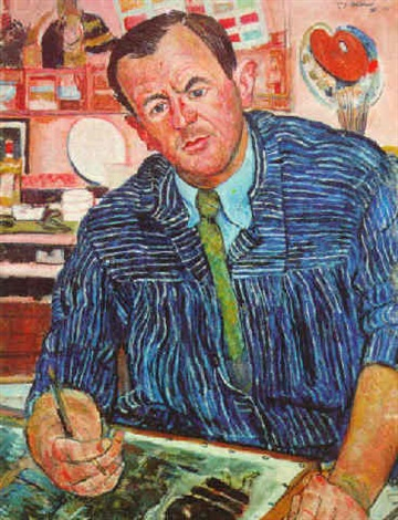 Portrait George Grosz, 1931